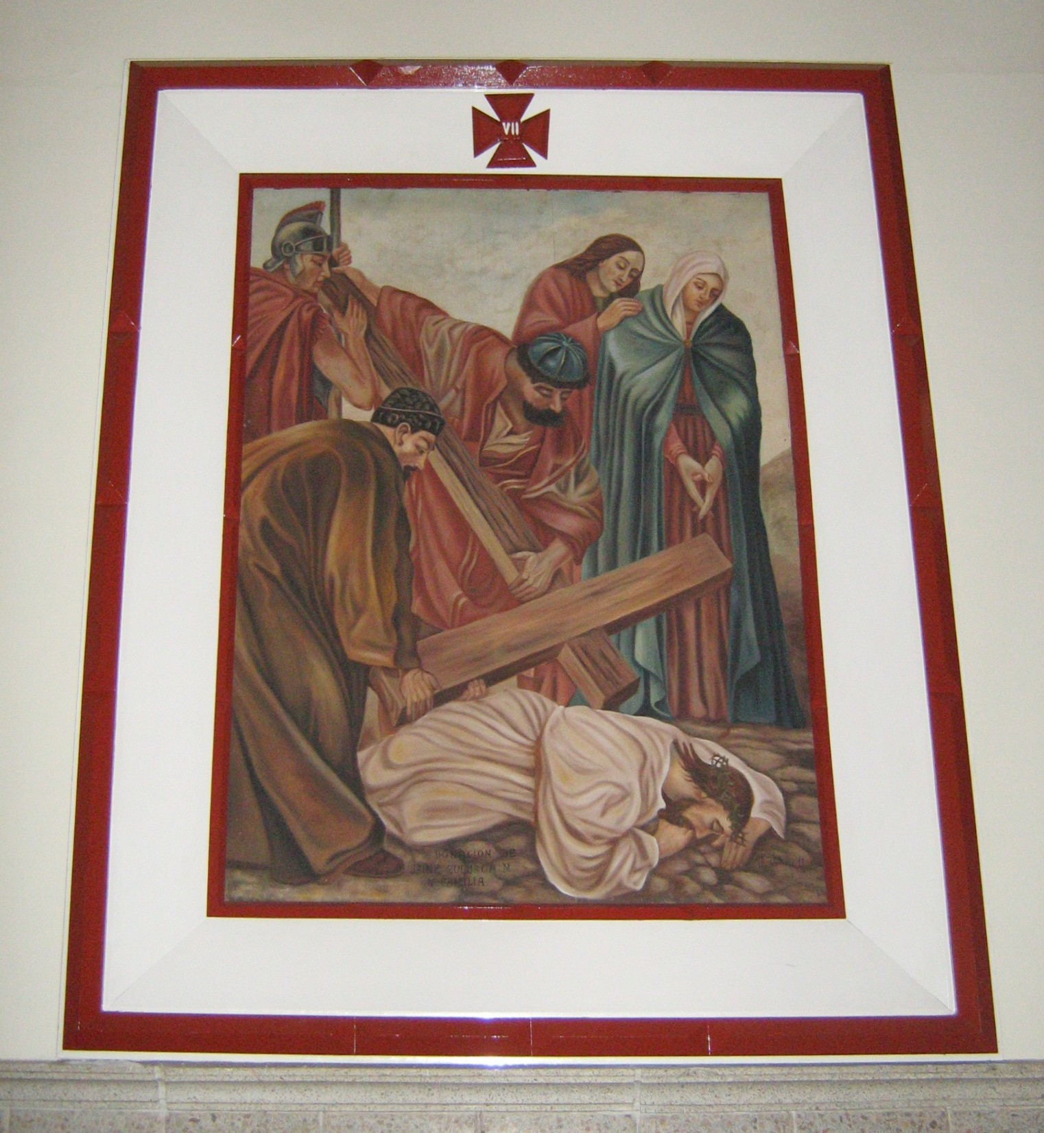 Estación VII del víacrucis de la Basílica de Yarumal, Antioquia, Colombia.